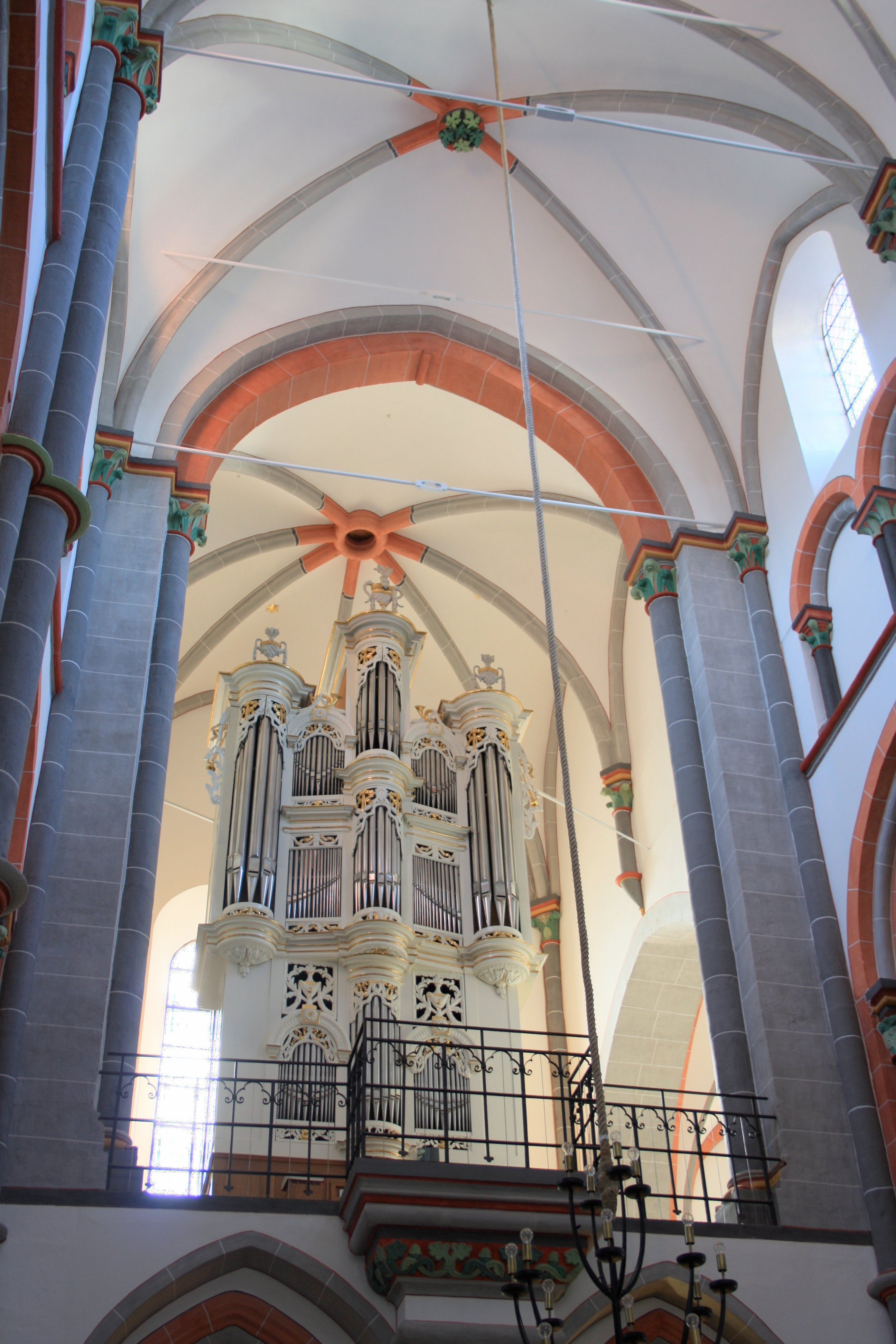 Bacharach, Stiftskirche St. Peter, Orgel